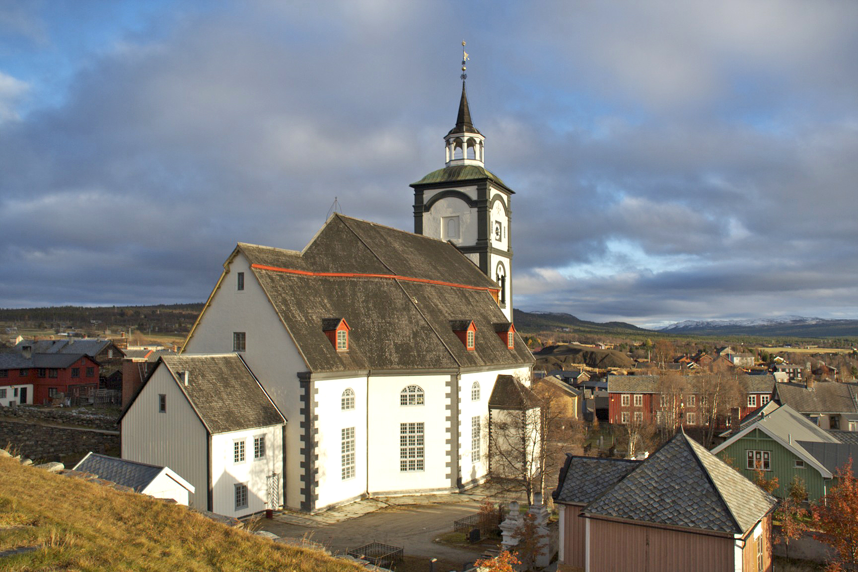 Sett fra øvre kirkegård. Foto: Lars Geithe, 2012